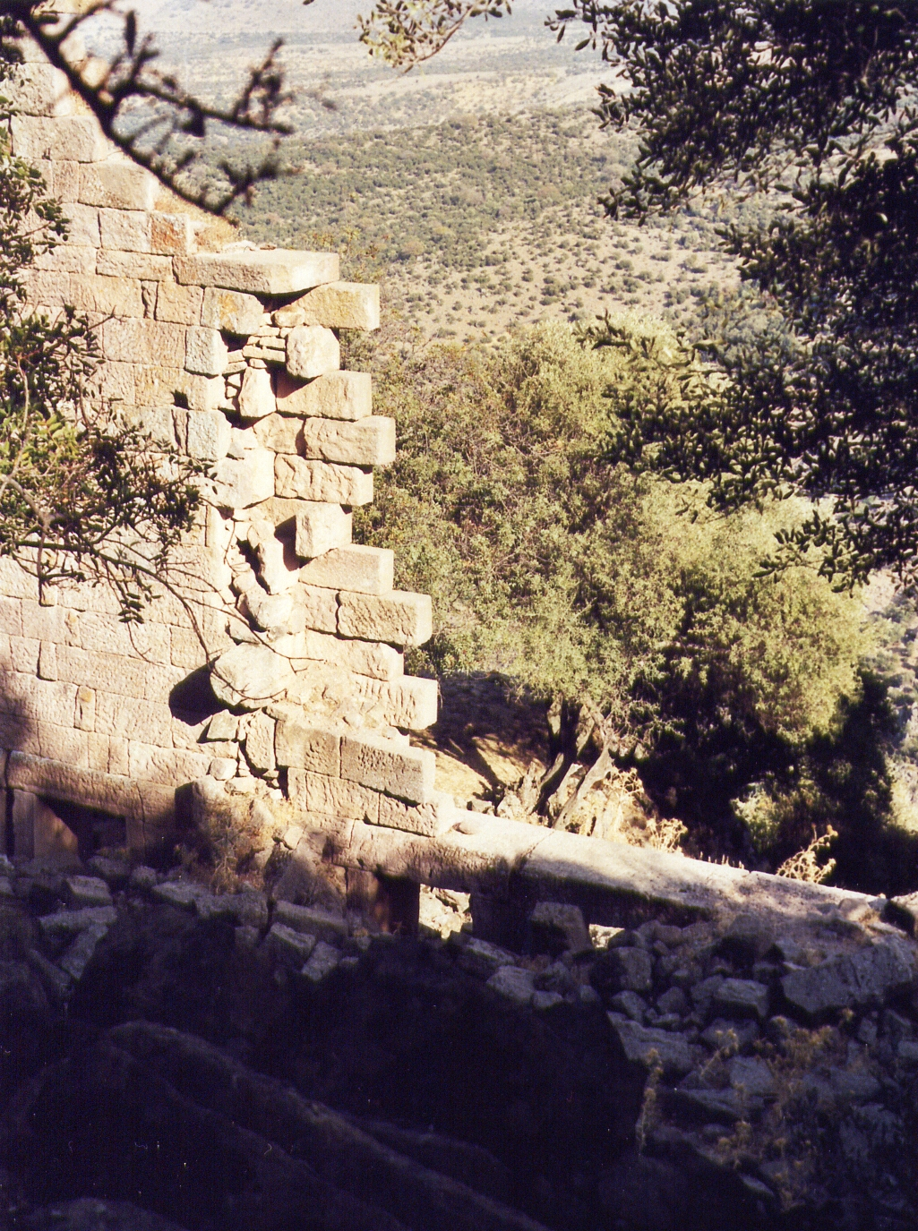 Aigai (Äolis), antike Stadt in der Westtürkei